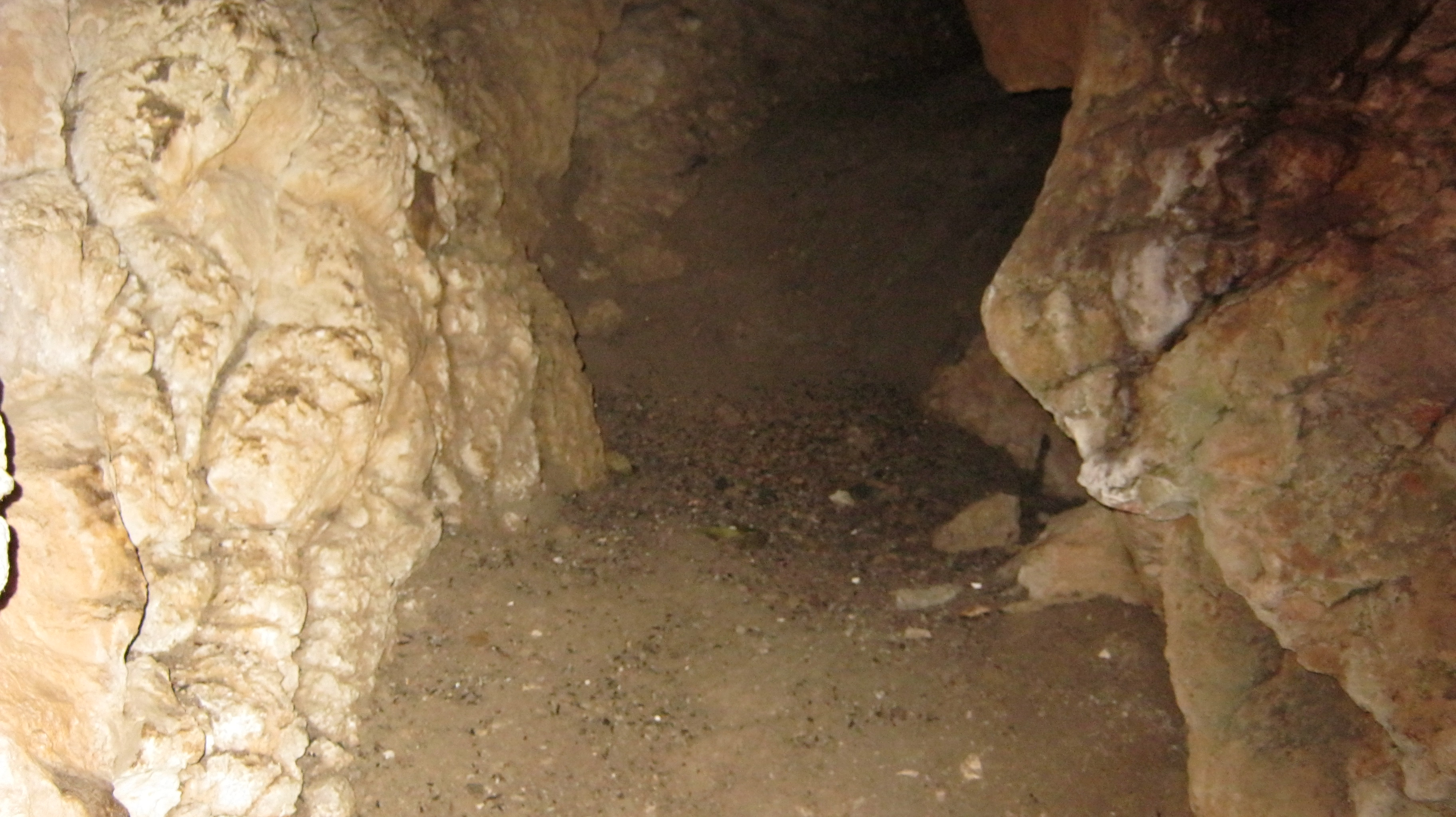 Српски (ћирилица): Унутрашњост Сибничке пећине